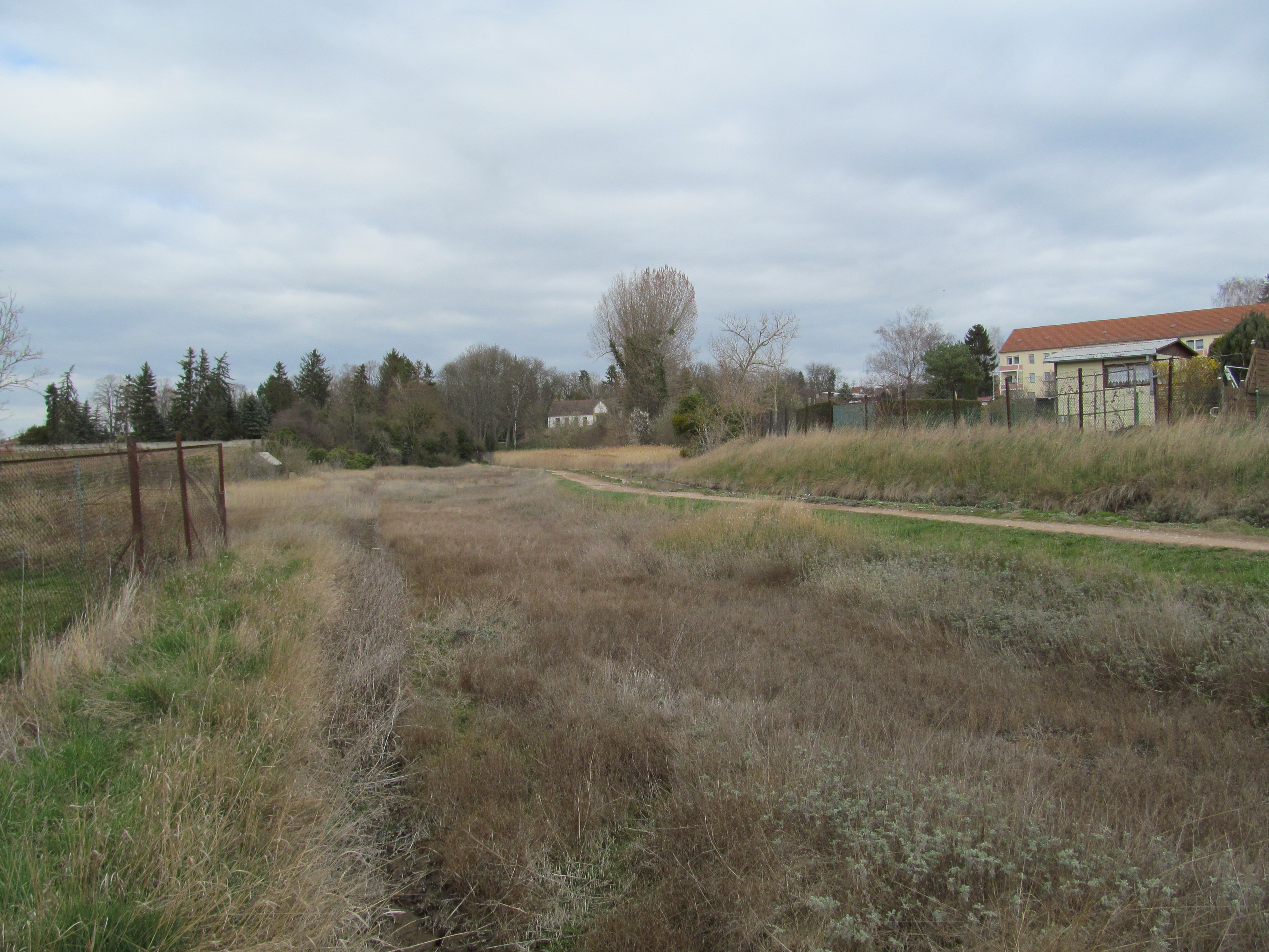 Trockengebiet neben dem Solgraben im Naturschutzgebiet Arterner Solgraben